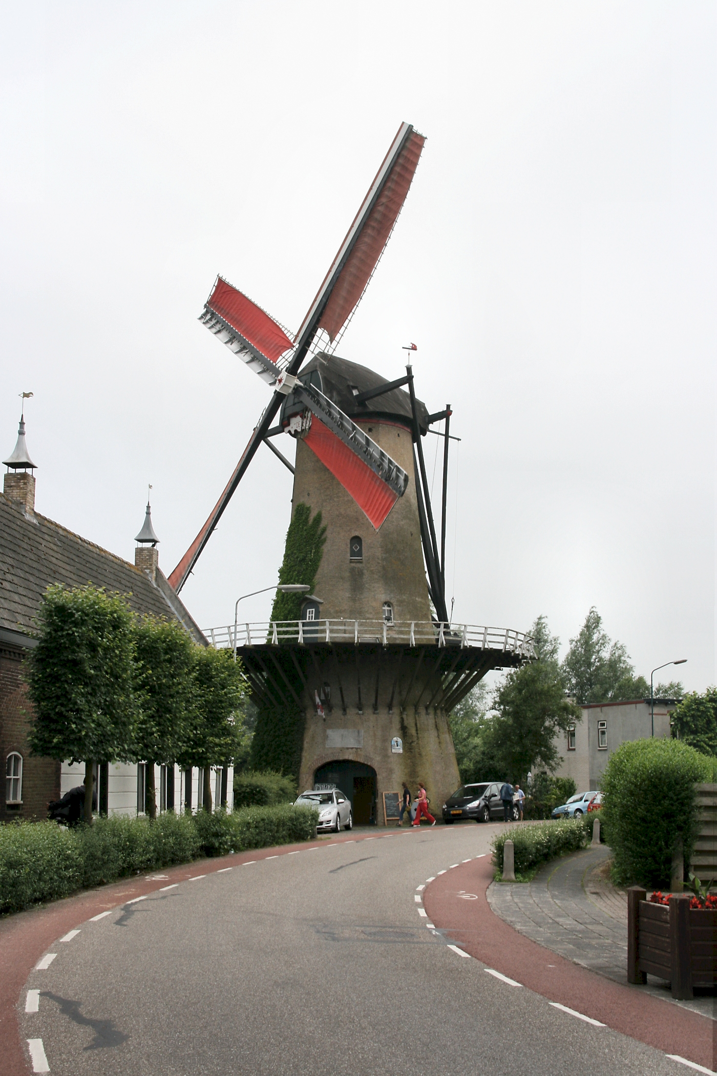 Terheijden: stellingmolen "De Arend" met zeilen